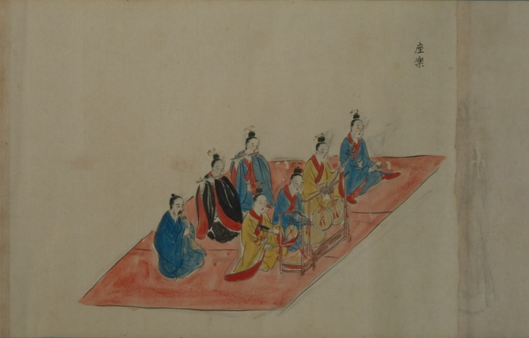 中文（香港）: 琉球宮廷音樂舞蹈